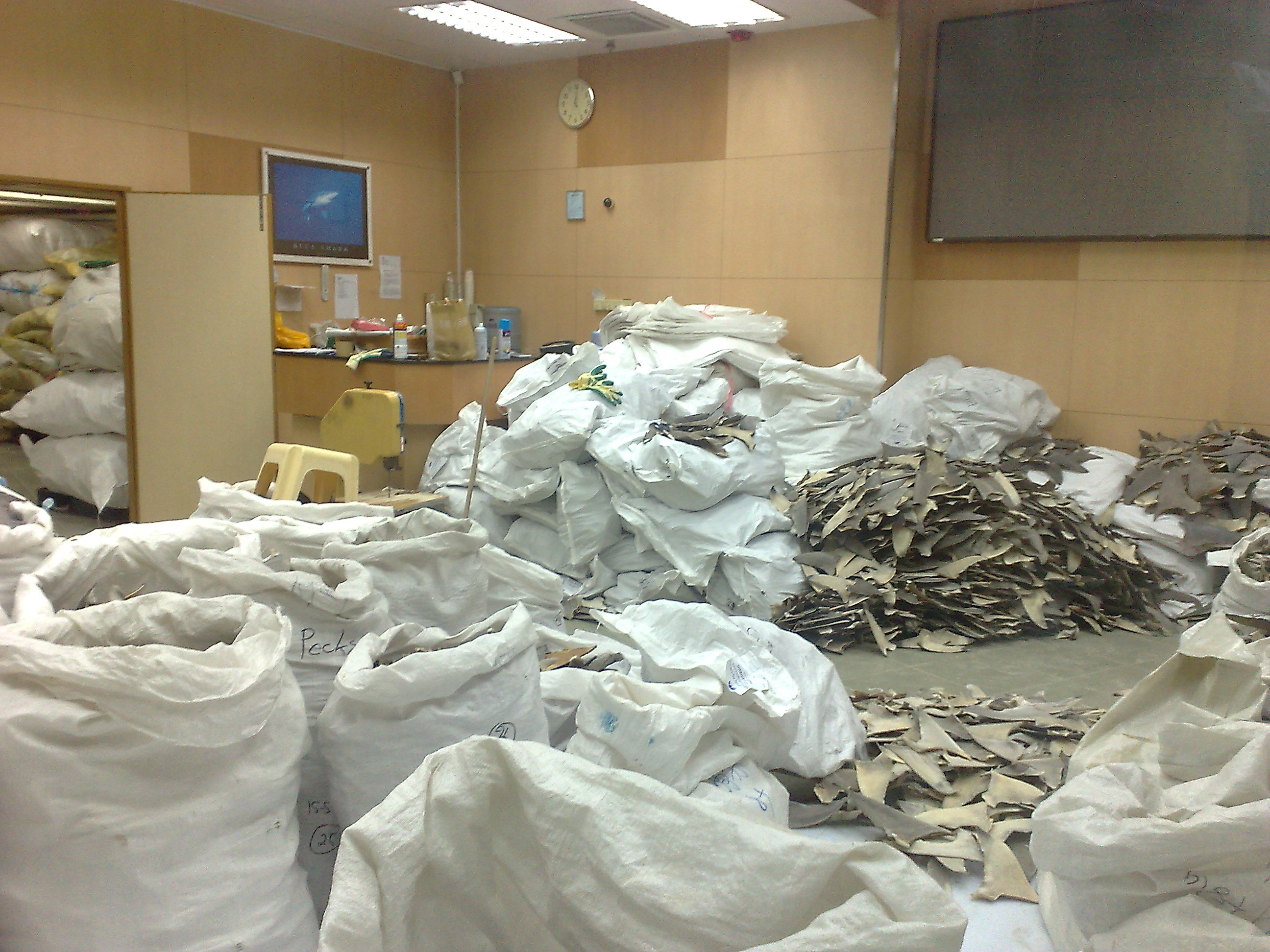 sharkfin-warehouse in Hong-Kong